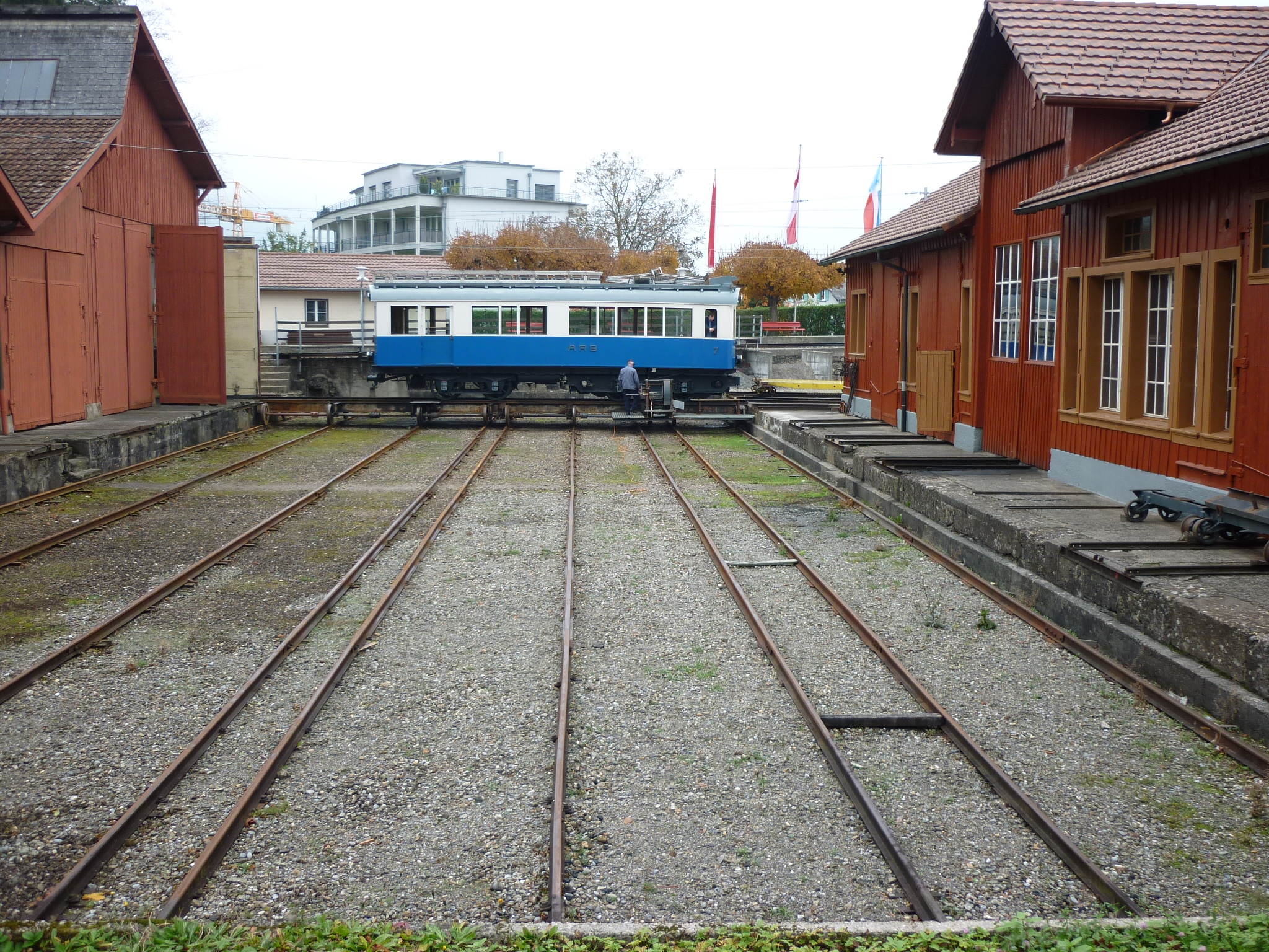 ARB Depot, Goldau SZ, Schweiz